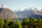 Sunndal Kommune, Møre og Romsdal. Utsikt mot Sunndalsøra.